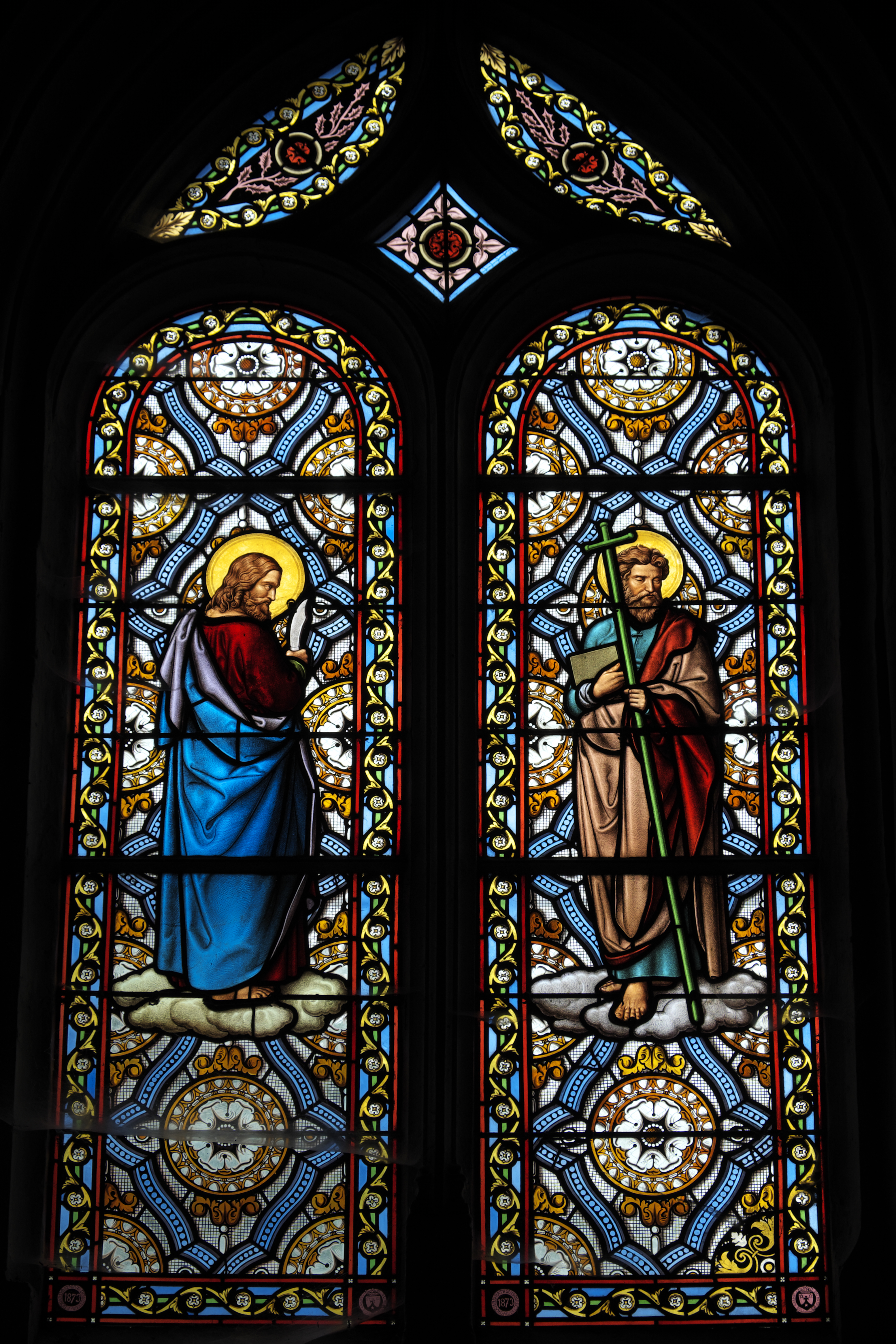 Katholische Pfarrkirche Notre-Dame in Bû im Département Eure-et-Loir (Centre-Val de Loire/Frankreich), Bleiglasfenster mit Signatur: CARMEL DU MANS EDOUARD RATHOUIS DIRECTEUR 1873; Darstellung: Apostel